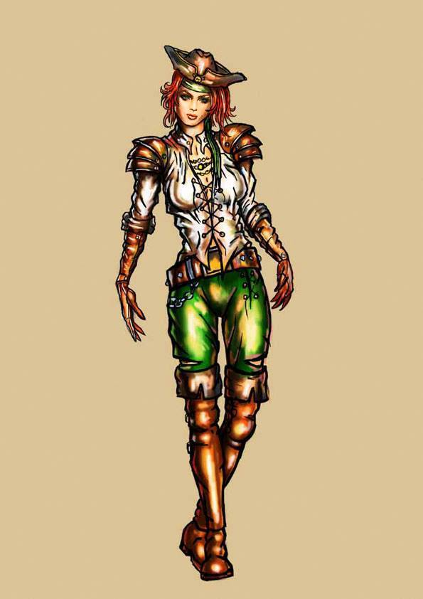 Mascota de Greentwip